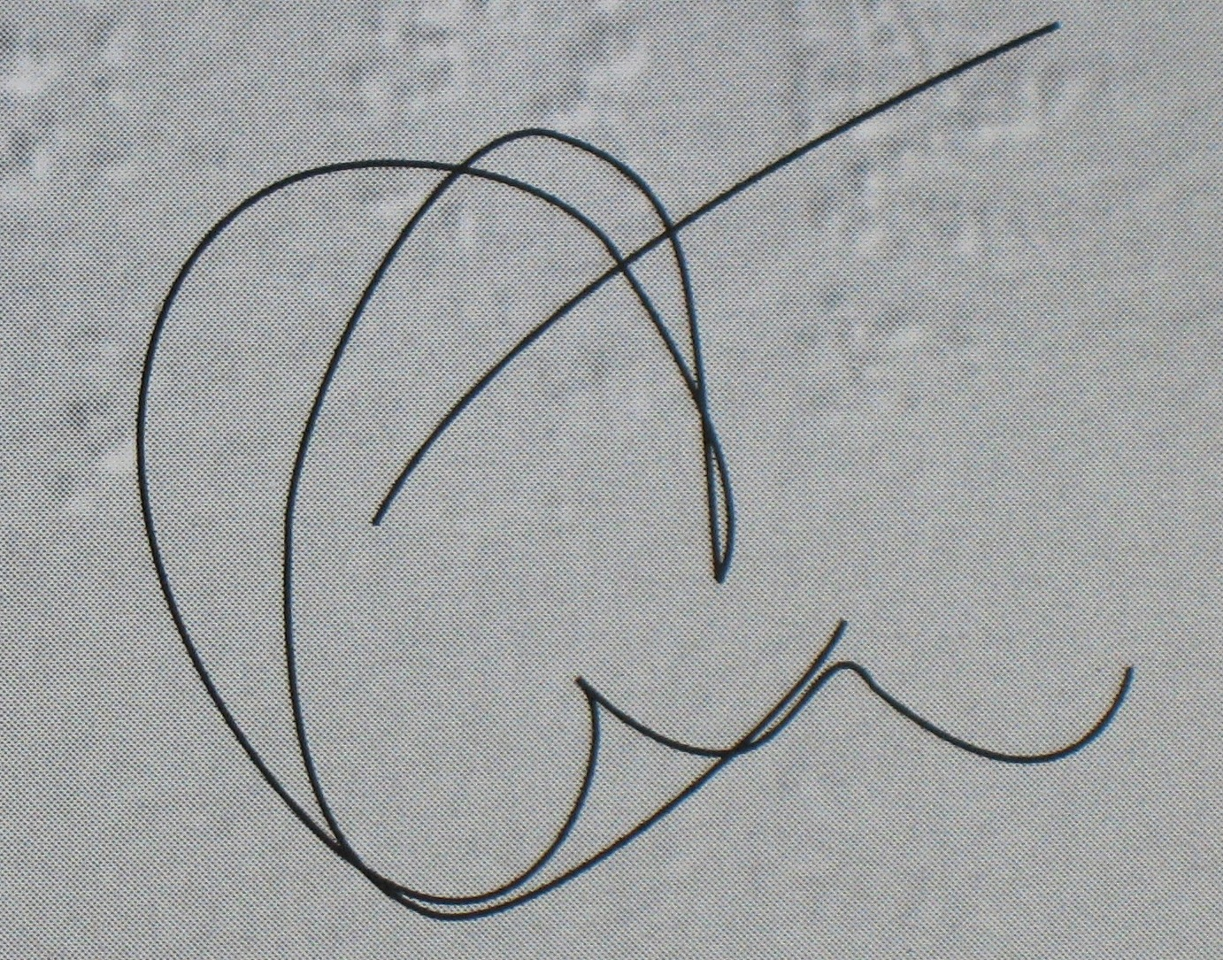 Рубен Акоста - президент Международной Федерации волейбола (ФИВБ, 1984—2008). Подпись на обращении к участникам международного волейбольного турнира в Москве, июнь 1997. Sportsman Ruben Acosta Hernandez (Mexico) signature (1997).